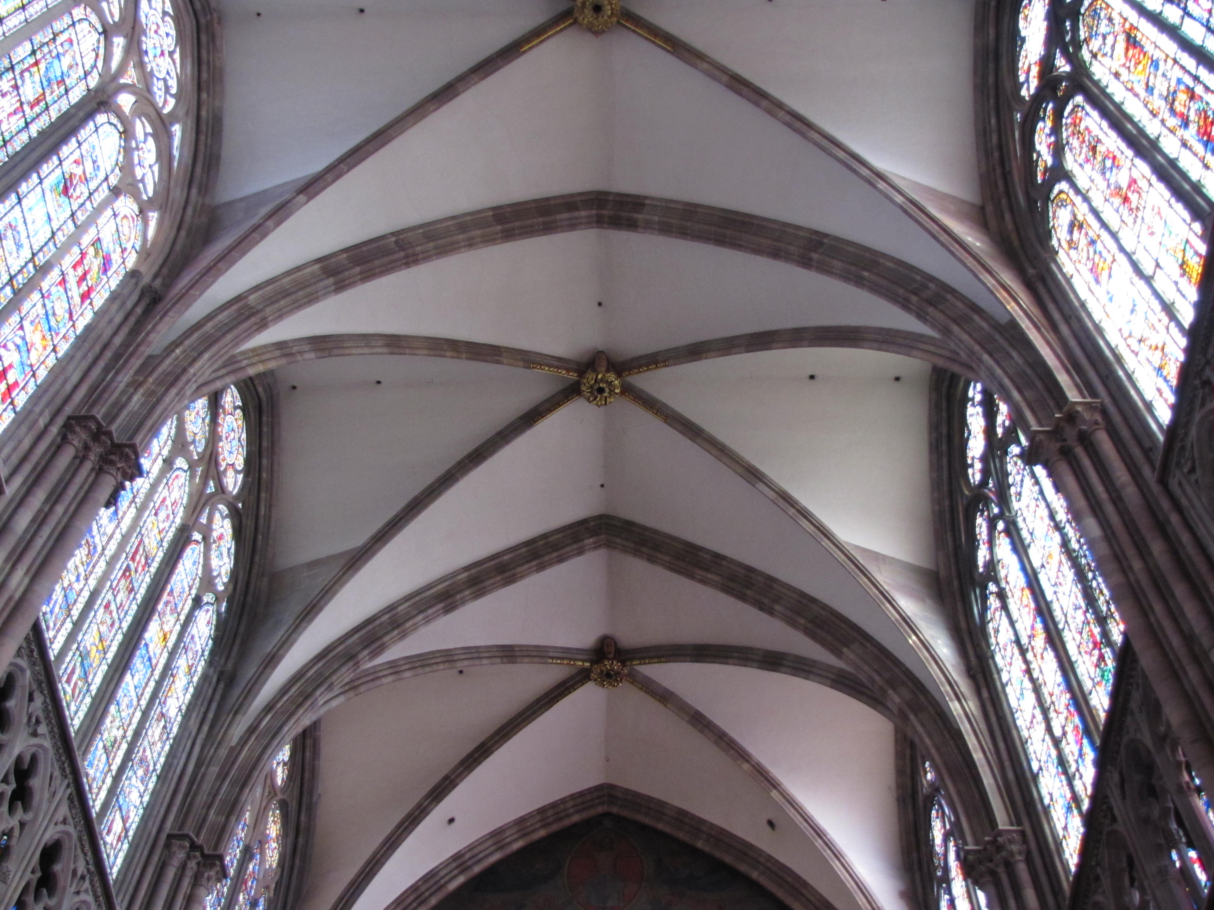 Alsace, Bas-Rhin, Cathédrale Notre-Dame de Strasbourg (PA00085015). Croisées d'ogives de la nef